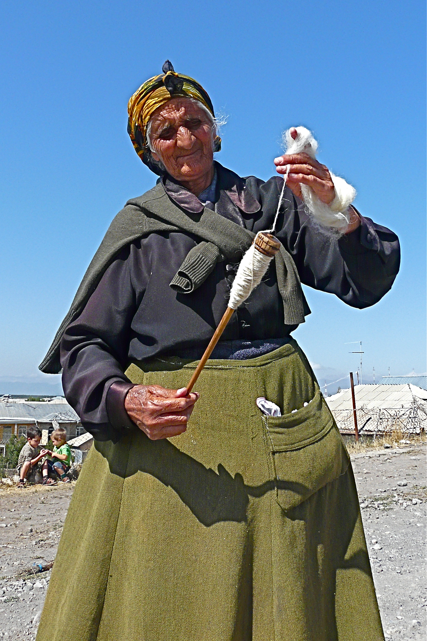 Een vrouwke met de typisch Armeense neus is schapenwol aan het spinnen.